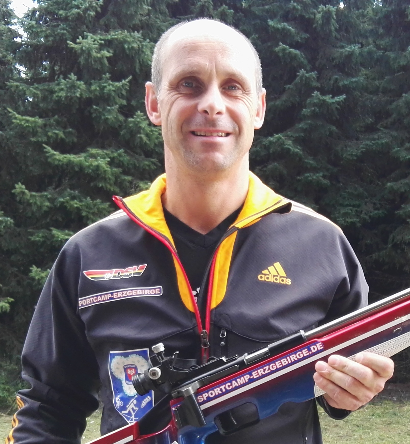 Biathlet Carsten Heymann, 2016